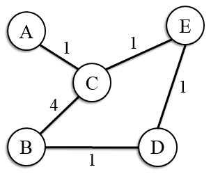 Inspiré de l'article : Contraction Hierarchies path finding algorithm, illustrated using three.js de Michael Tandy